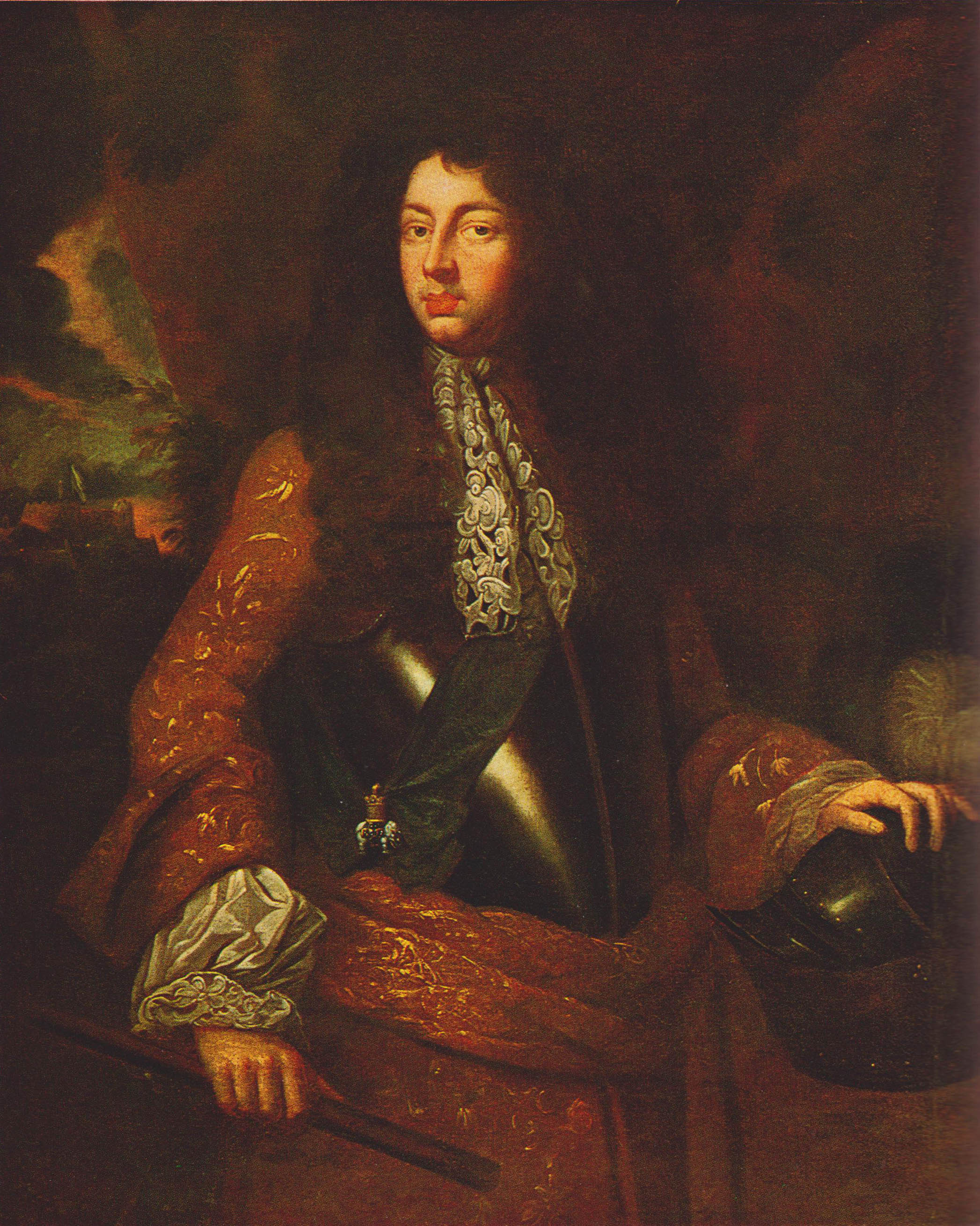 Markgraf Johann Friedrich (Öl auf Leinwand, um 1670/80, Residenz Ansbach)